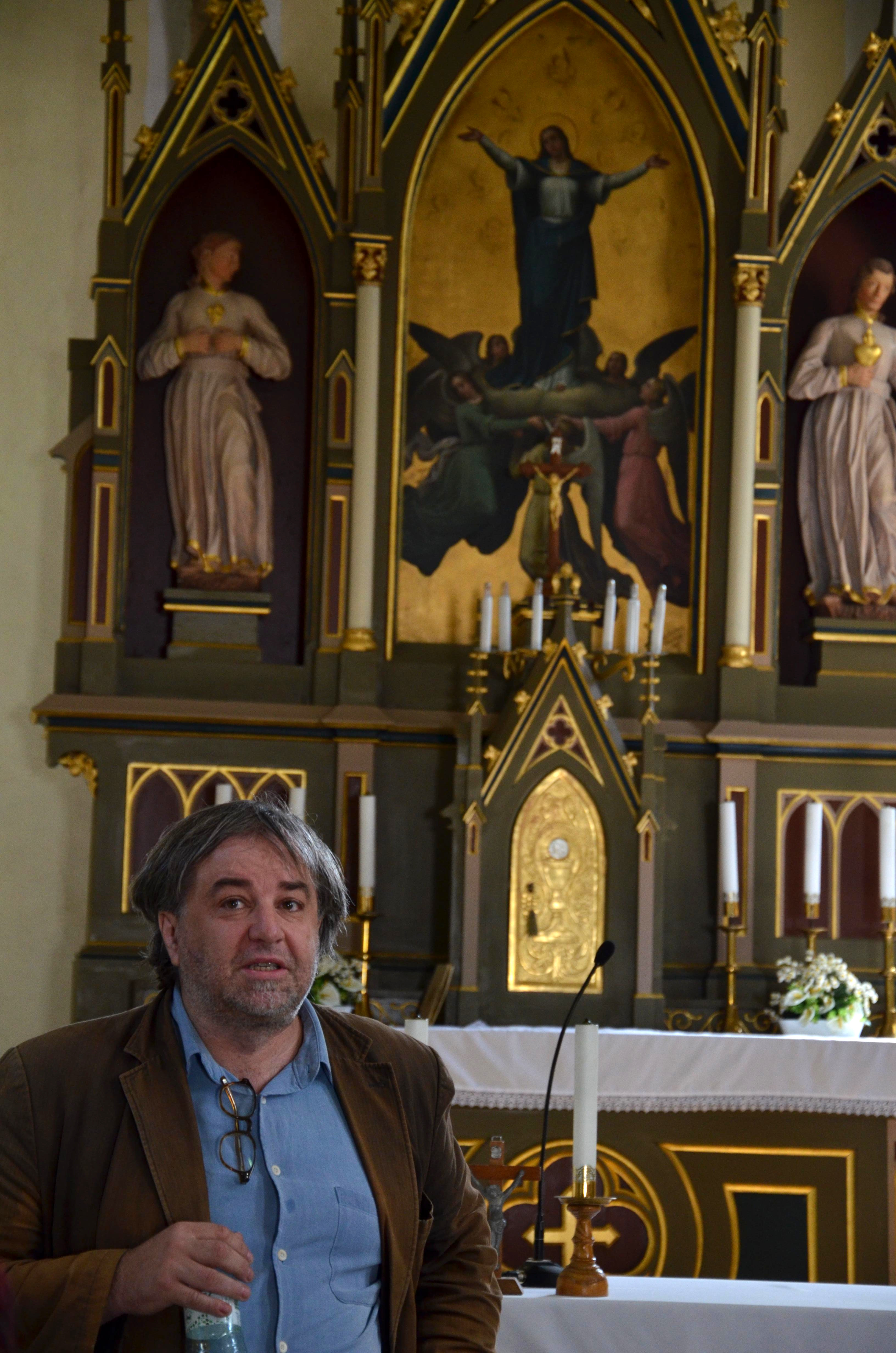 Miloš Doležal, Číhošť 16. 6. 2018